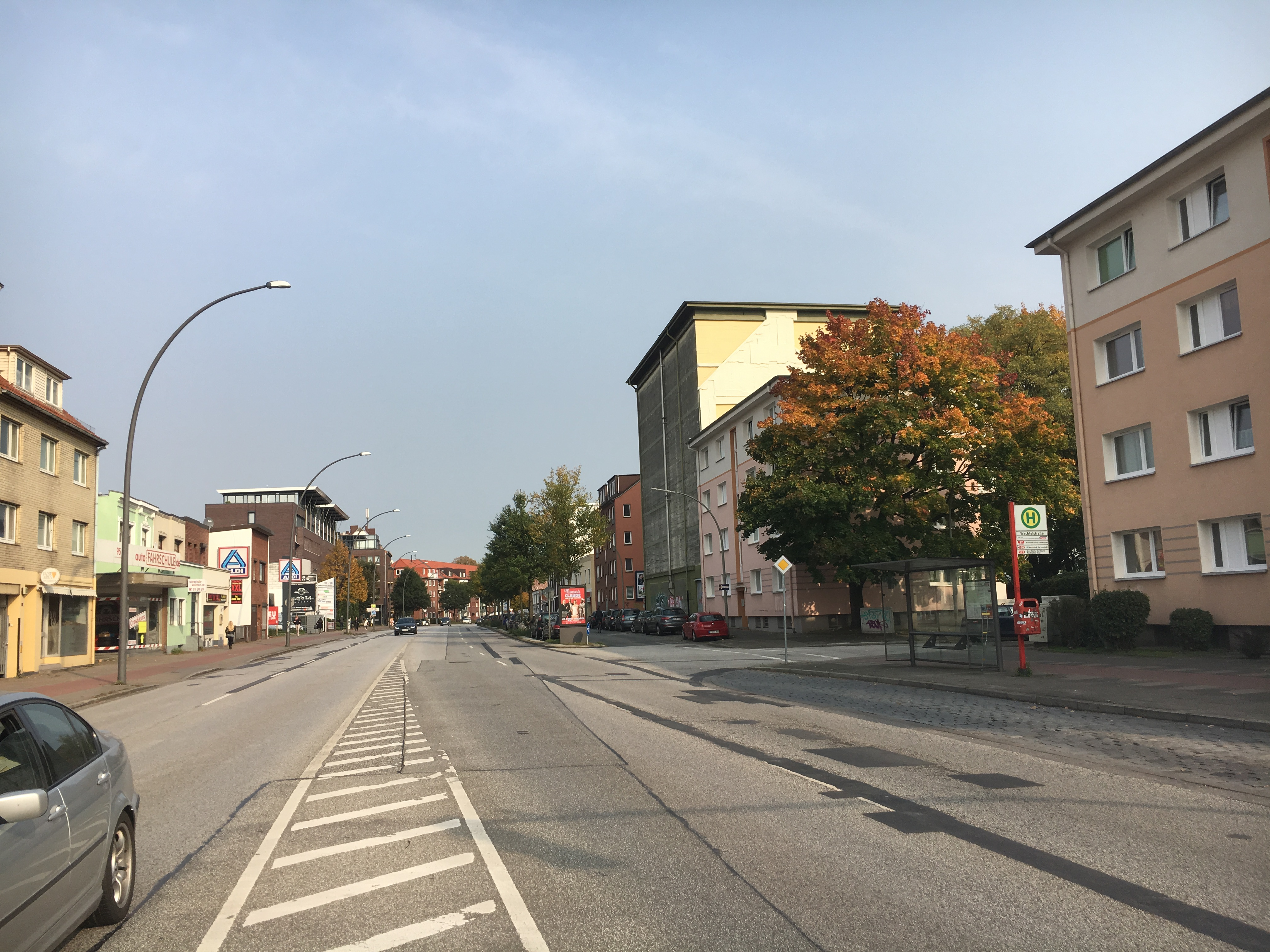 Bramfelder Straße, Blick von der Kreuzung Wachtelstraße in Richtung Norden